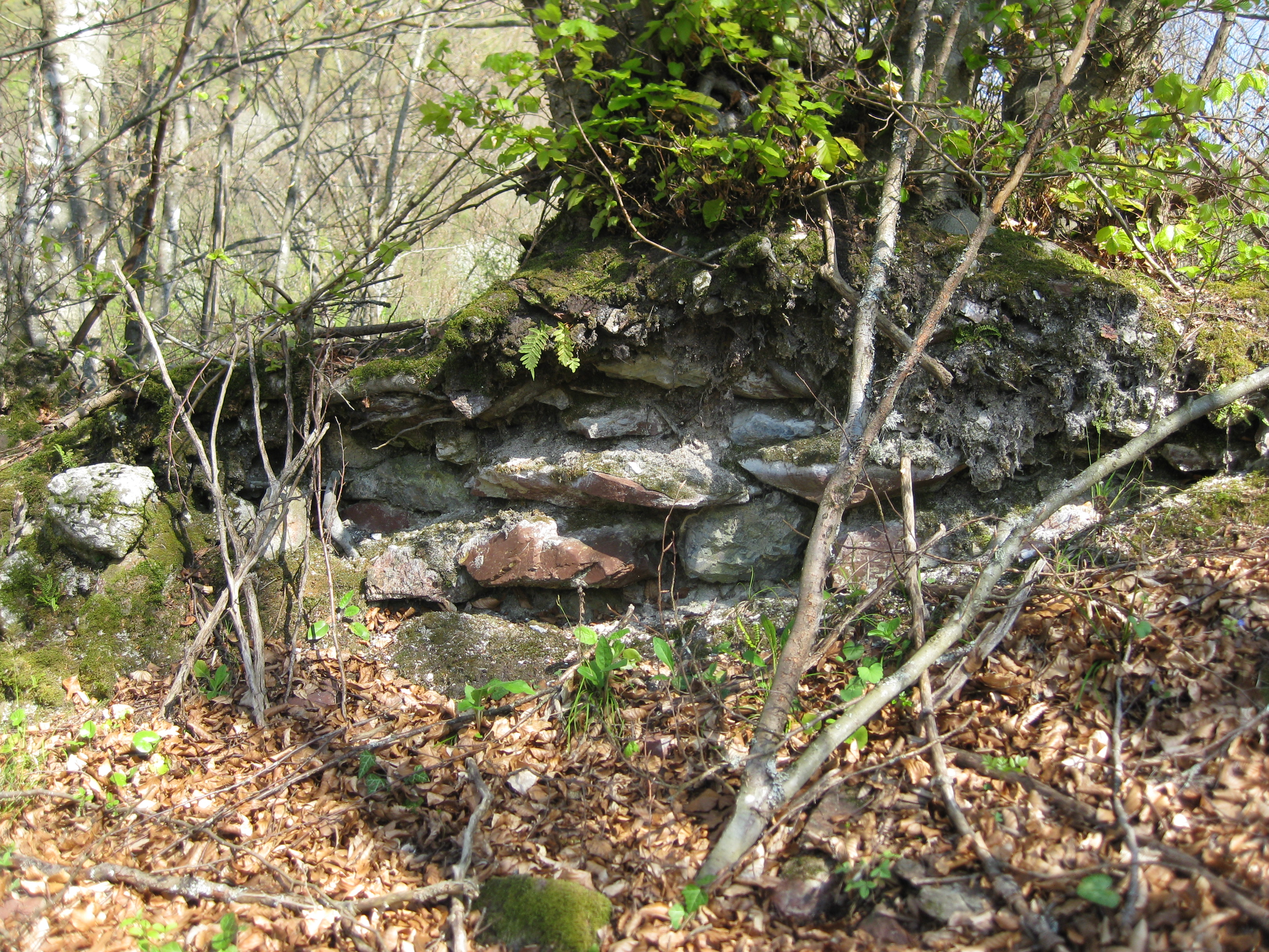 Srpskohrvatski / српскохрватски: Ruin in Gornji Žirovac (Gradina or Gradac).